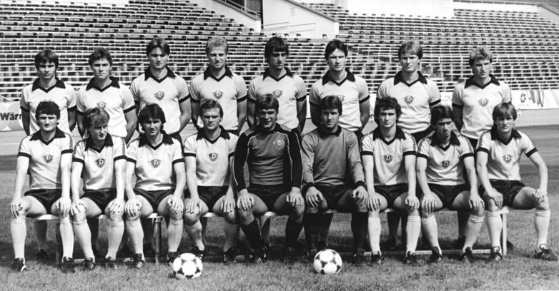 ADN-ZB-Häßler-8.10.82-zin-Dresden: Die Fußball-Oberligamannschaft SG Dynamo Dresden für die Spielserie 1982-83. Der Vizemeister und Pokalsieger der Saison 1981-82 möchte in der neuen Spielserie an die Erfolge des Vorjahres anknüpfen und vor allem seine spielerischen und kämpferischen Potenzen vervollkommnen. Das Aufgebot der Elbestädter: Hintere Reihe vl.n.r.: Dirk Losert, Matthias Döschner, Andreas Mittag, Karsten Petersohn, Ralf Minge, Andreas Trautmann, Udo Schmuck und Mannschaftskapitän Hans-Jürgen Dörner. vordere Reihe v.l.n.r.: Andreas Schmdit, Steffen Lachmann, Reinhard Häfner, Frank Schuster, Torhüter Bernd Jakubowski, Torhüter Jörg Klimpel, Hans-Uwe Pilz, Lutz Schülbe und Torsten Gütschow.